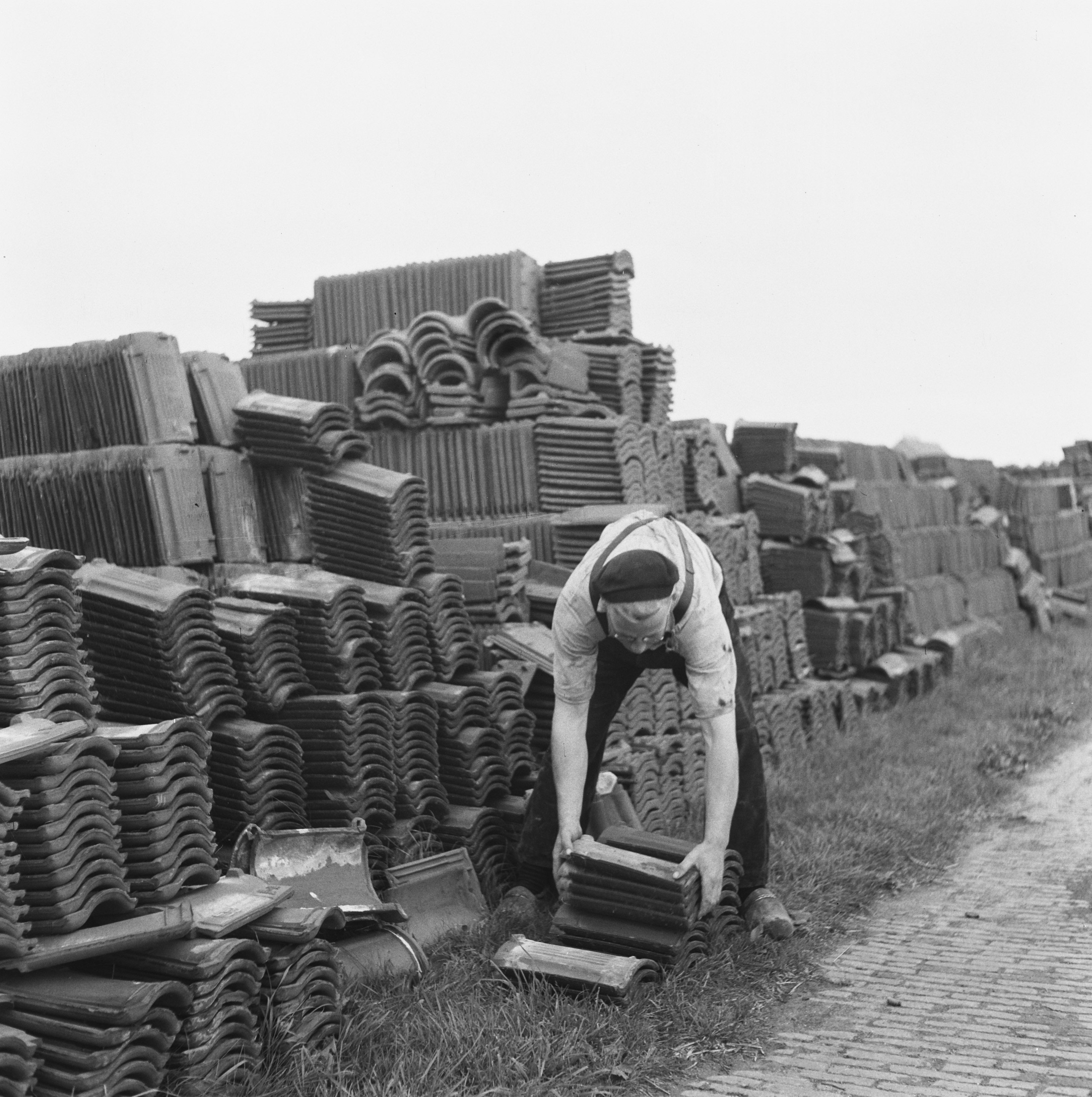 Collectie / Archief : Fotocollectie Anefo Reportage / Serie : Herstel: Wieringermeer Beschrijving : Drooglegging van de Wieringermeerpolder. Man bij stapels bakstenen Datum : 1945 Locatie : Noord-Holland, Wieringermeer Trefwoorden : herstel Fotograaf : Fotograaf Onbekend / Anefo Auteursrechthebbende : Nationaal Archief Materiaalsoort : Negatief (zwart/wit) Nummer archiefinventaris : bekijk toegang 2.24.01.03 Bestanddeelnummer : 900-8323